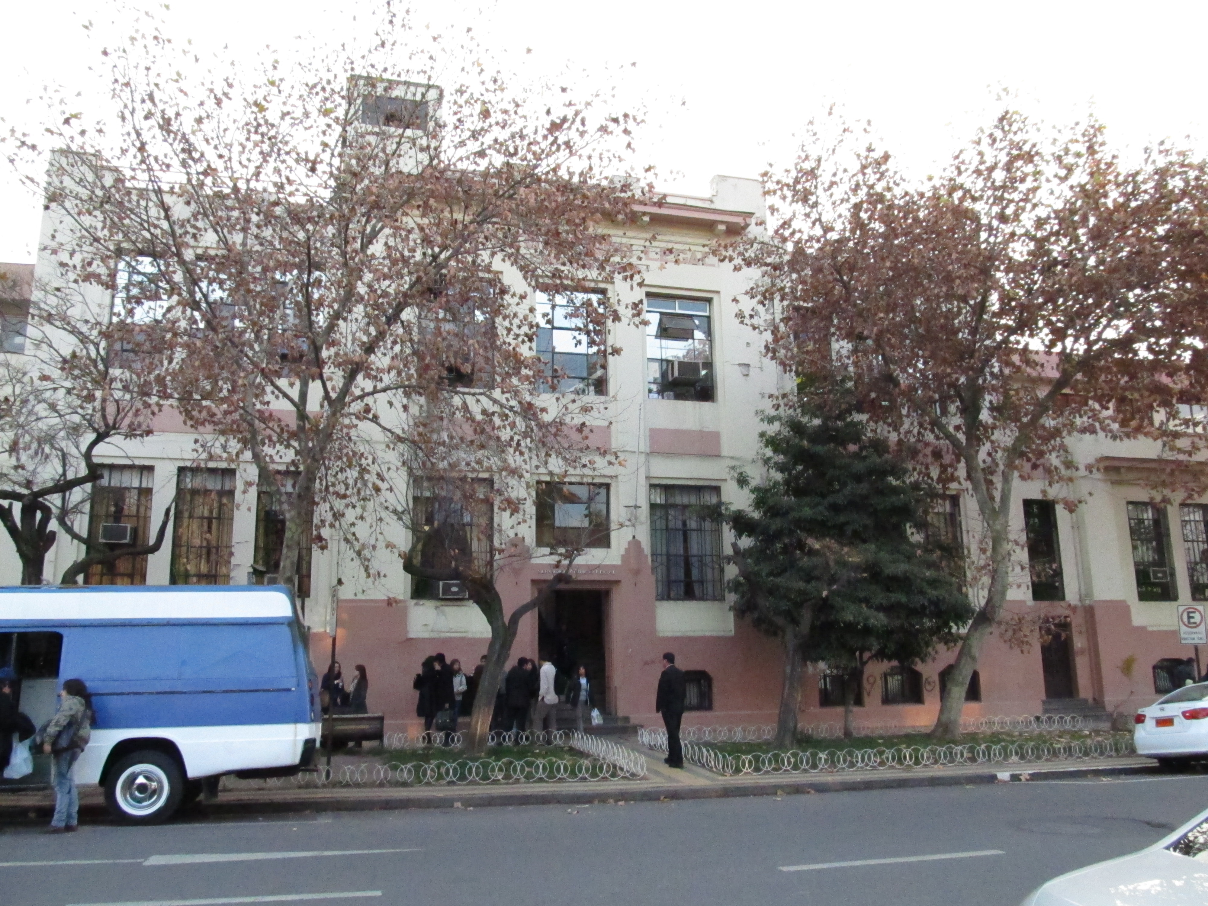 Servicio Médico Legal, avenida La Paz 1012, Santiago de Chile.